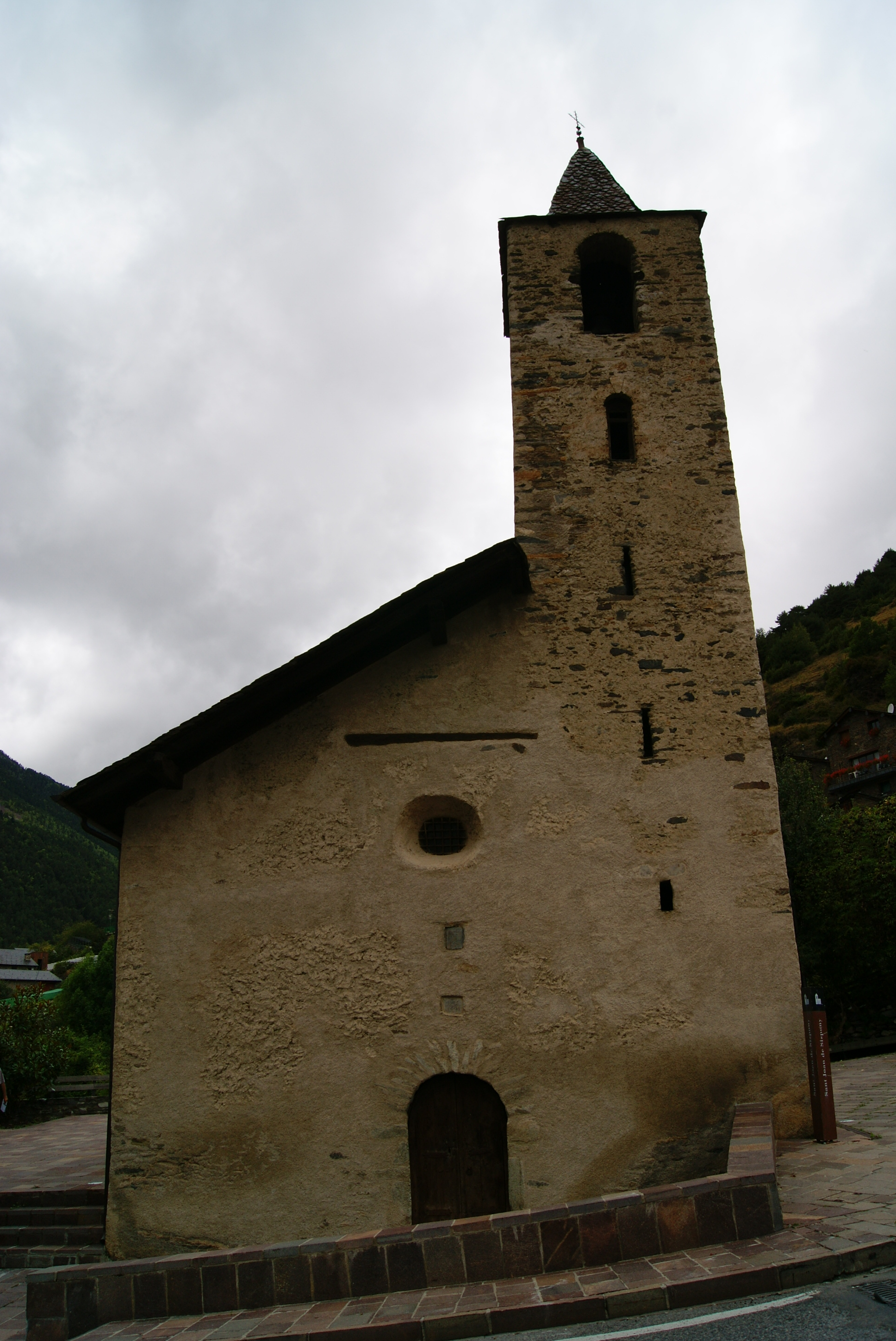 Església de Sant Joan de Sispony